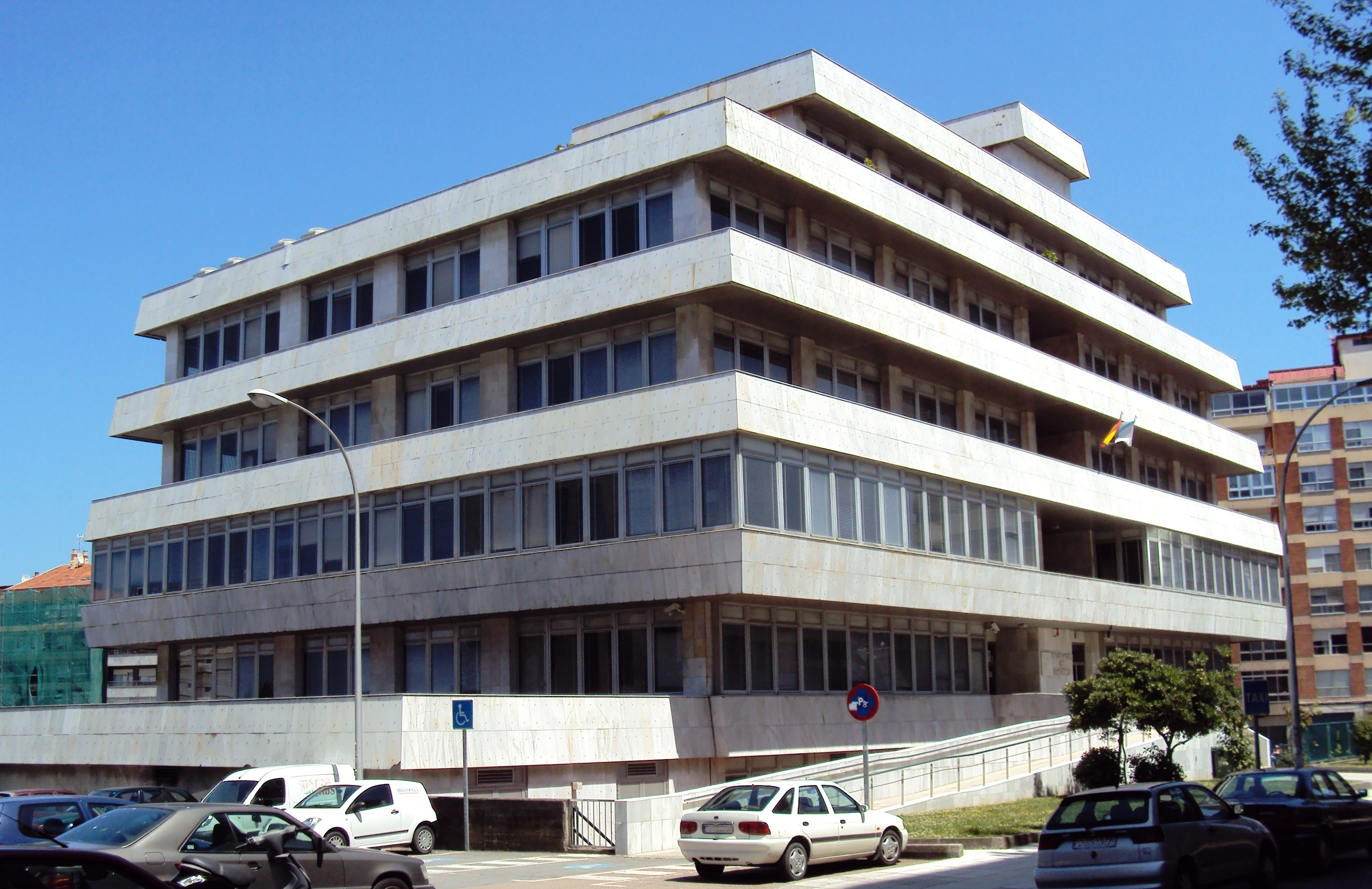 Edificio do Ministerio de Facenda en Vigo, Galicia